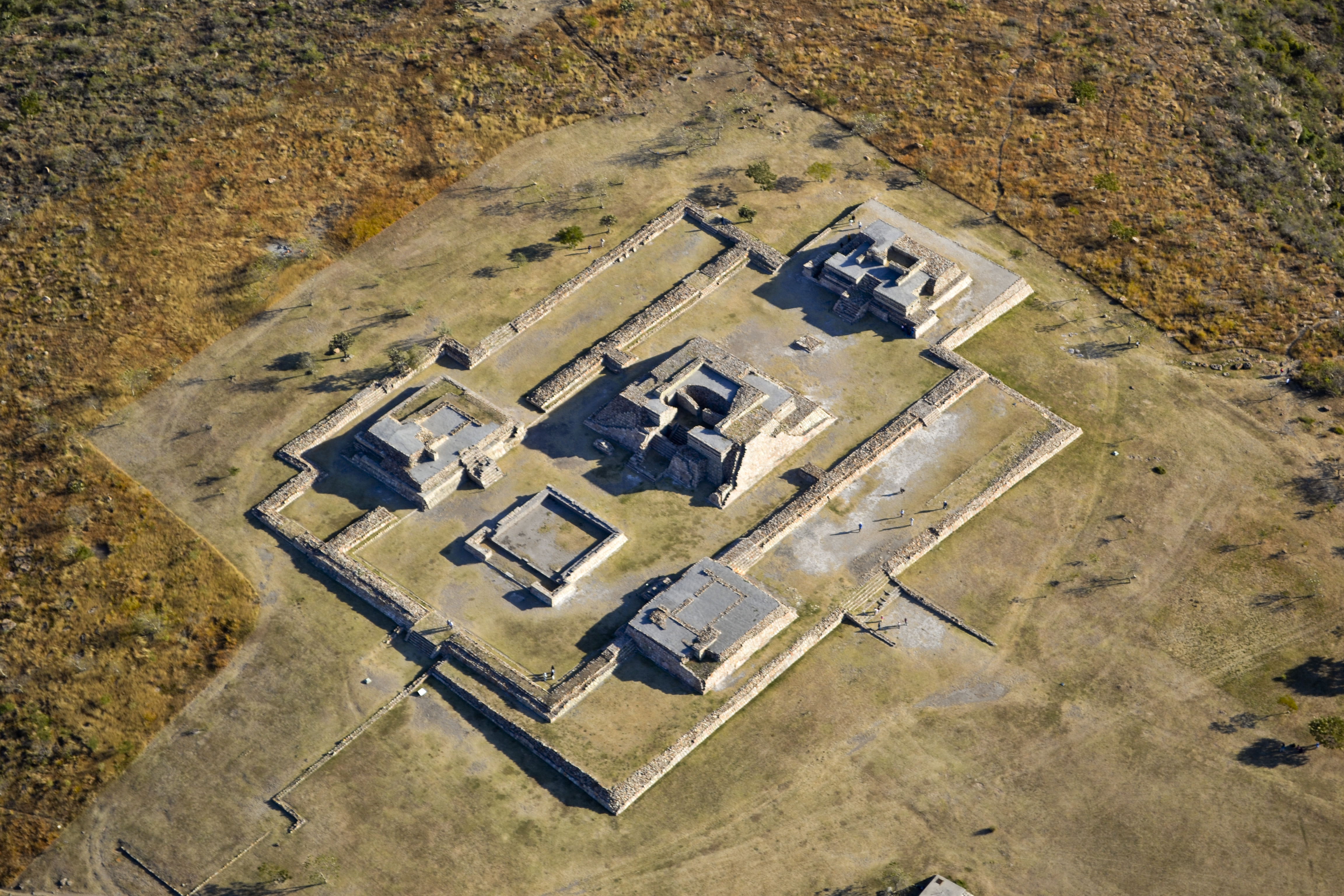 Zona Arqueológica de Plazuelas. Pénjamo, Guanajuato.